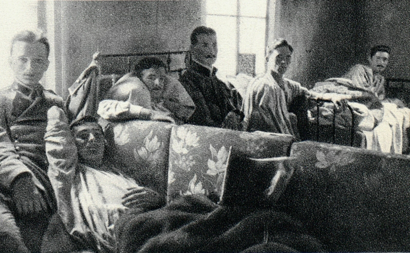 Ranni pod Stobychwą (na Wołyniu) z 1 Pułku Ułanów Legionów Polskich w szpitalu polowym w Kowlu.